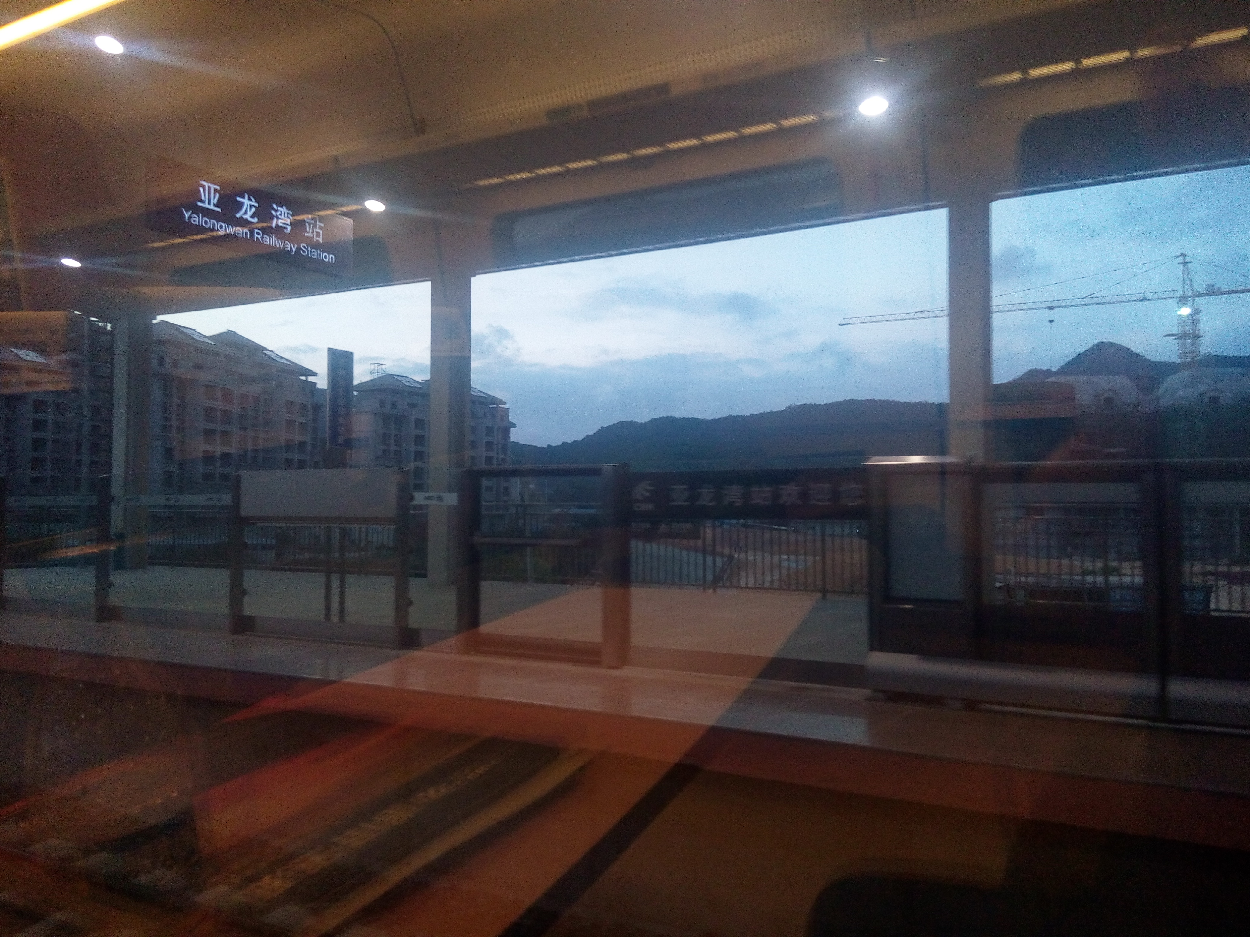 海南三亚的亚龙湾站